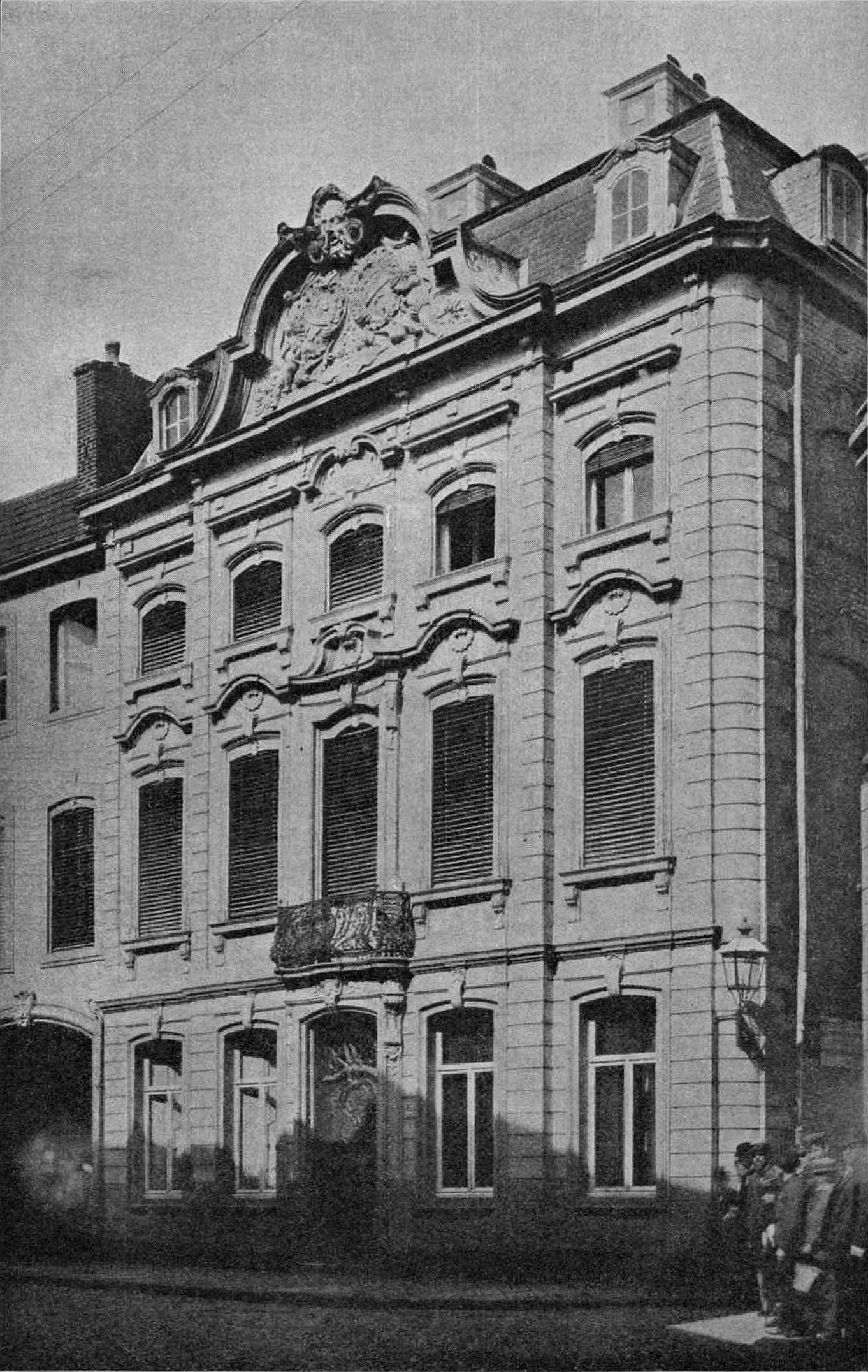 Neubau des Wespienhaus in Aachen nach Johann Joseph Couven